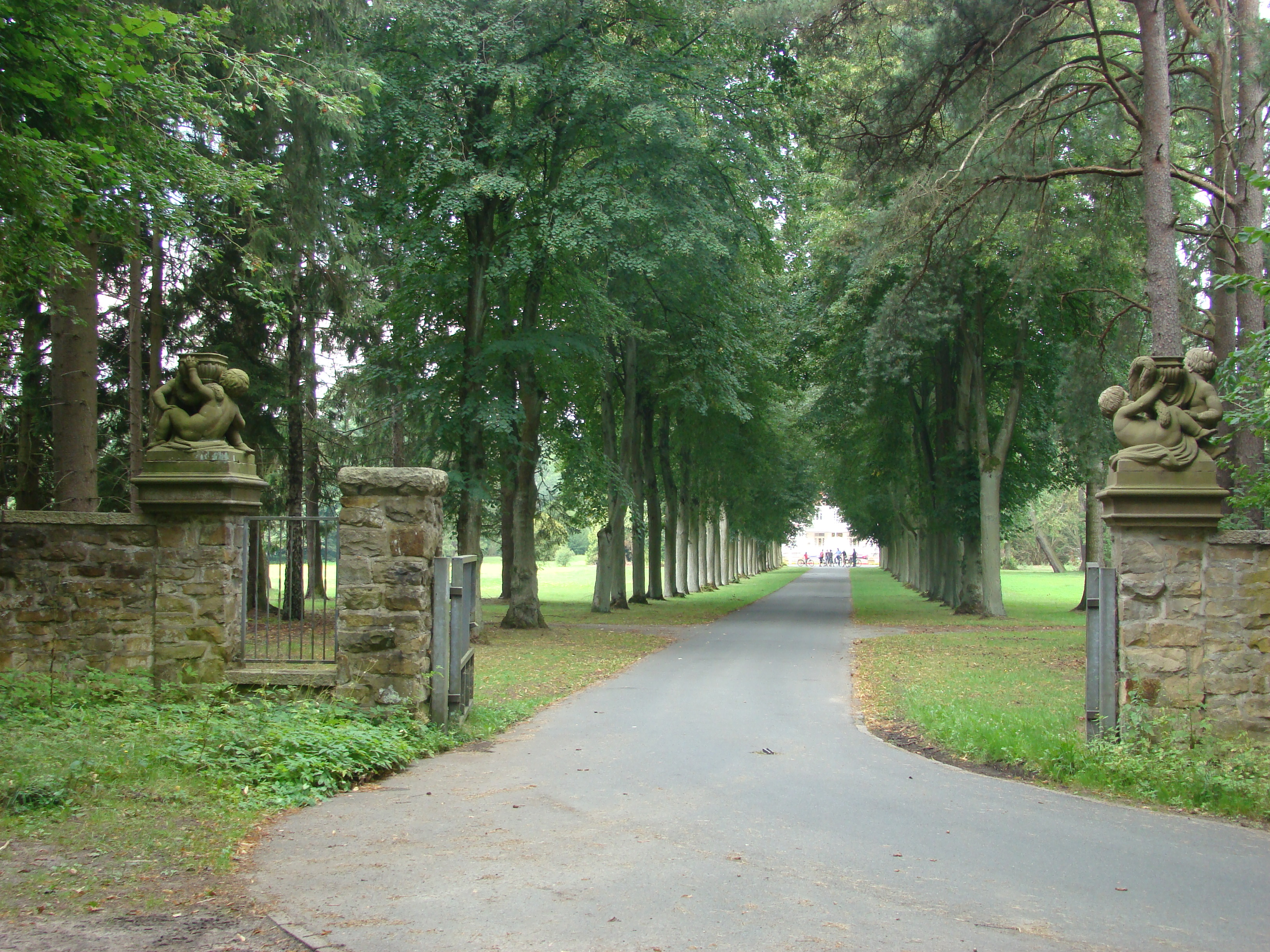 Einfahrt zum Schloss Bredebeck, mit Lindenallee